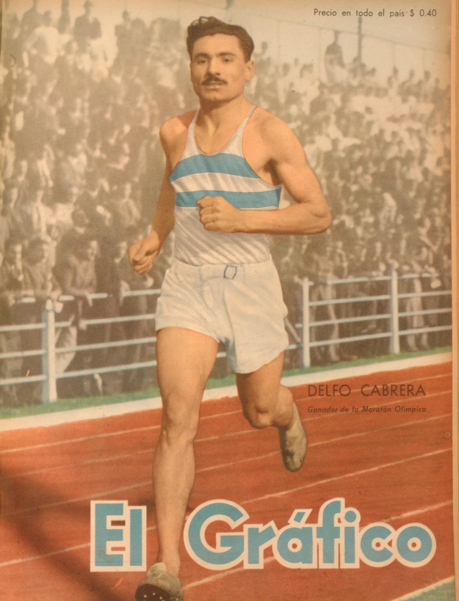 El Grafico del 20 de Agosto de 1948. Edicion 1519